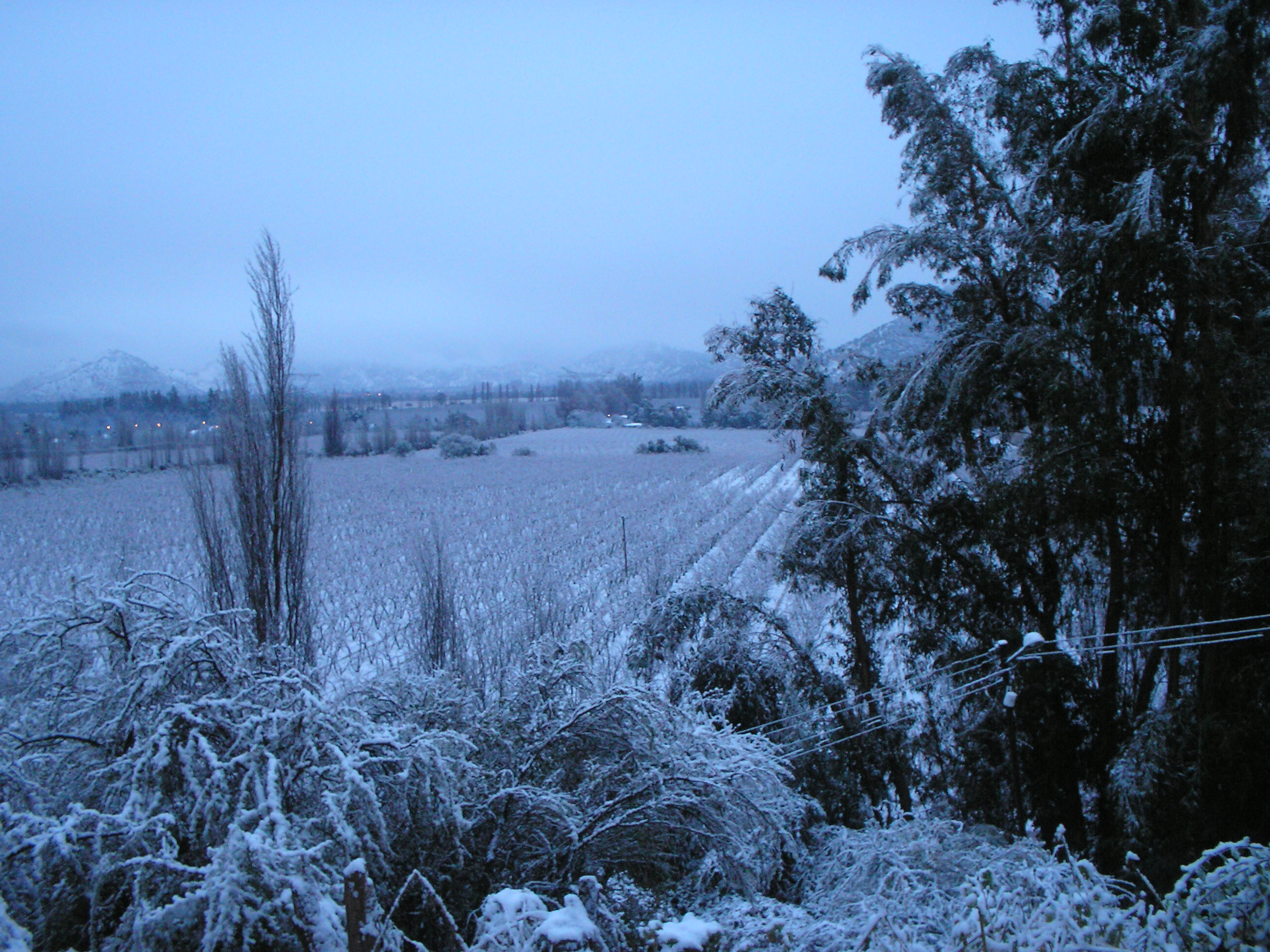 Fotografía desde cerro La Carmelita (localidad de La Punta, sexta región, Chile) luego de una nevada.